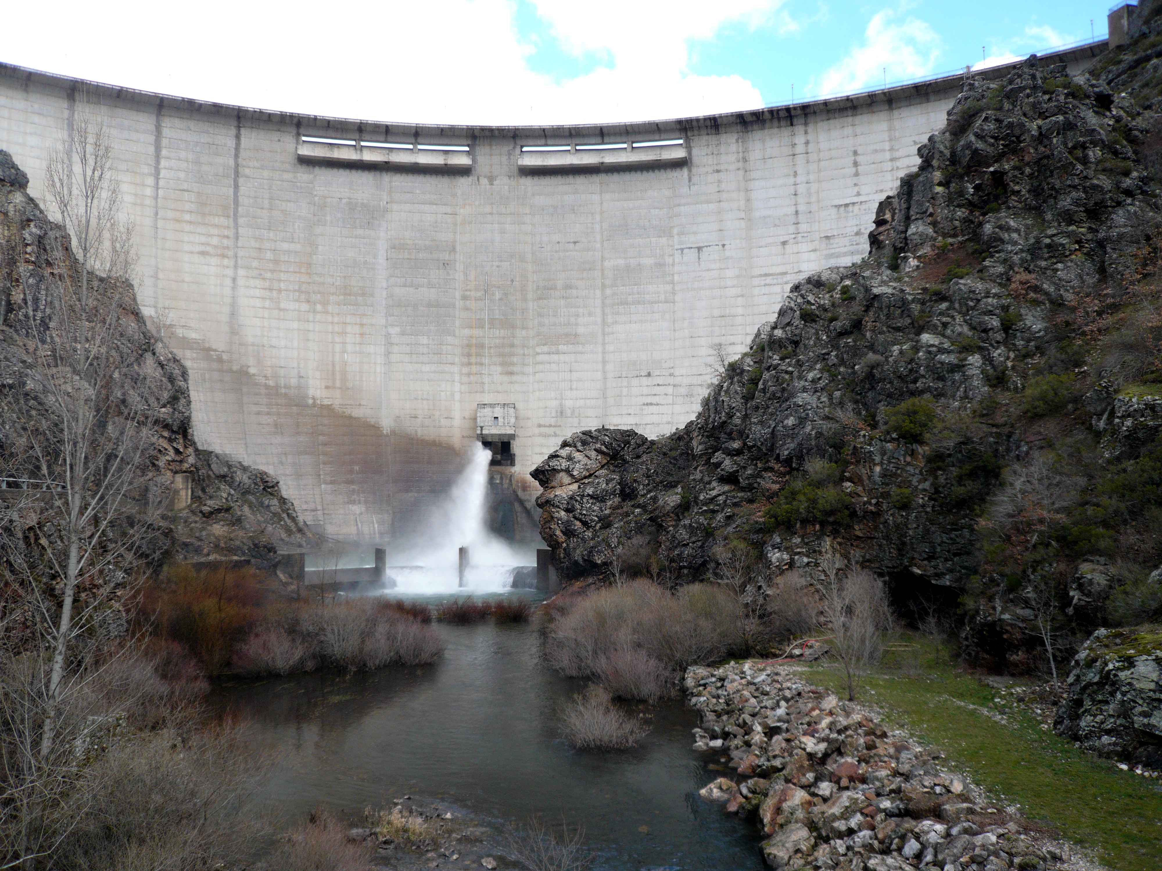 La presa de Riaño, perteneciente a la cuenca del Duero, está situada en el término municipal de Crémenes (León) sobre el río Esla. Toma su nombre del pueblo más importante de los que quedaron inundados por las aguas de este embalse. La capacidad del mismo es de 641 Hm cúbicos. El uso prioritario es el regadío de la vega baja del río Esla, y también satisface en determinadas épocas del año, la demanda de la central hidroeléctrica situada a pie de presa. Asimismo garantiza el mantenimiento de un caudal ecológico del río Esla que oscila entre 2.5 metros cúbicos por segundo y un máximo de 5 metros cúbicos por segundo (recomendado). Se trata de una presa de tipo bóveda (con doble curvatura) con contorno asimétrico. La altura de la presa es de 100.6 m. El espesor máximo de los arcos es de 16.5 m y el mínimo es de 4.2 m. La presa tiene 4 galerías horizontales y una galería perimetral. La presa de Riaño tiene dos aliviaderos de superficie. El aliviadero superior es central sin compuertas, con una capacidad de descarga de 166 metros cúbicos por segundo para el Nivel de Avenida de Proyecto (NAP). El aliviadero lateral está situado en el estribo derecho, dispone de dos compuertas Taintor de 8x7 m, y tiene una capacidad de descarga de 836 metros cúbicos por segundo para el NAP. Dispone de un doble desague de fondo, cada uno circular de 1 m de diámetro, localizados en el bloque central. La capacidad de cada desague para el Nivel Máximo Normal (NMN) es de 21.72 metros cúbicos por segundo. El doble desague de aligeramiento controla el nivel de embalse por debajo de la cota de los aliviaderos. Son circulares de 2 m de diámetro y la capacidad de desague de cada uno es de 99 metros cúbicos por segundo para el NMN.